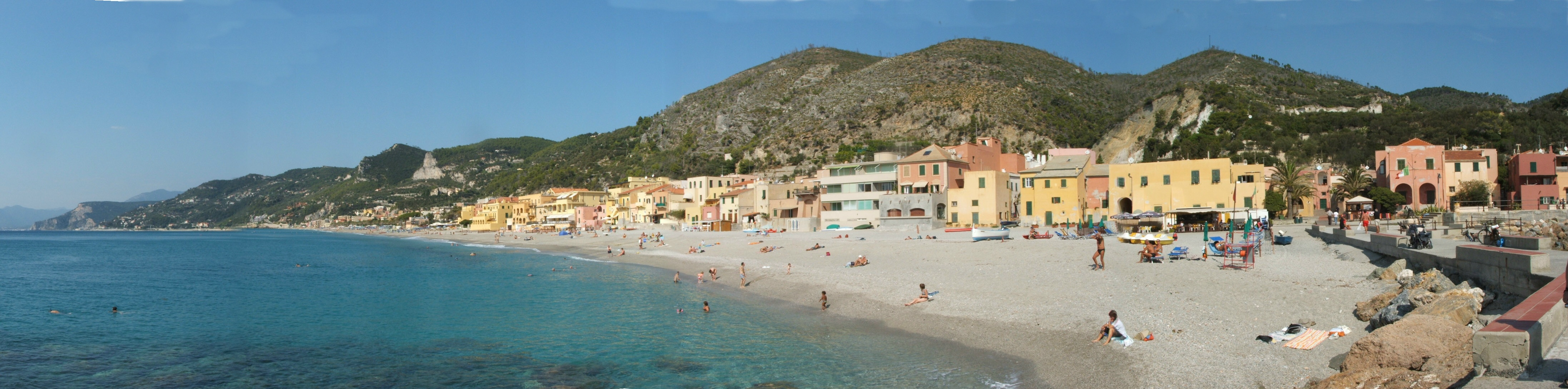 Varigotti, baia dei Saraceni, immagine panoramica della spiaggia - Google Maps - Google Earth